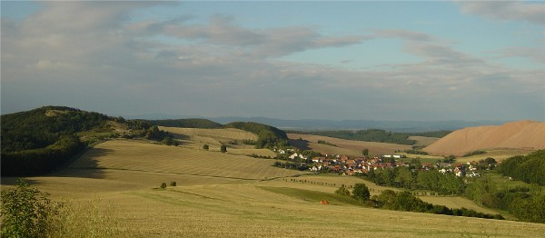 Das Dorf Holungen (Eichsfeld), von der Hohenkammer aus gesehen.